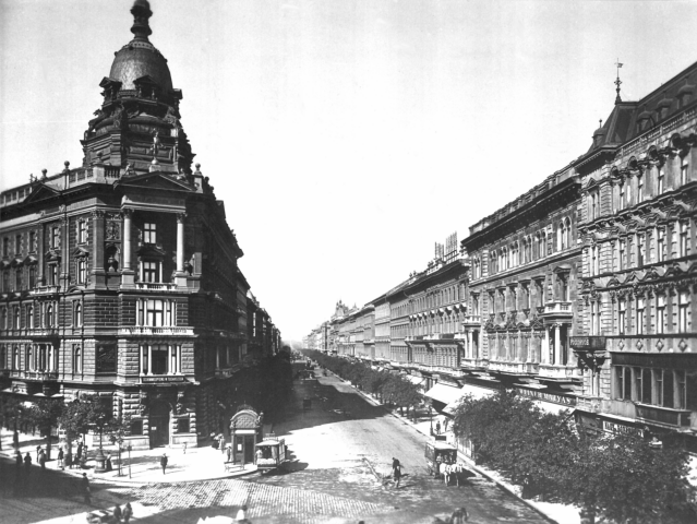 Andrássy út eleje, Bajcsy-Zsilinszky út sarka.